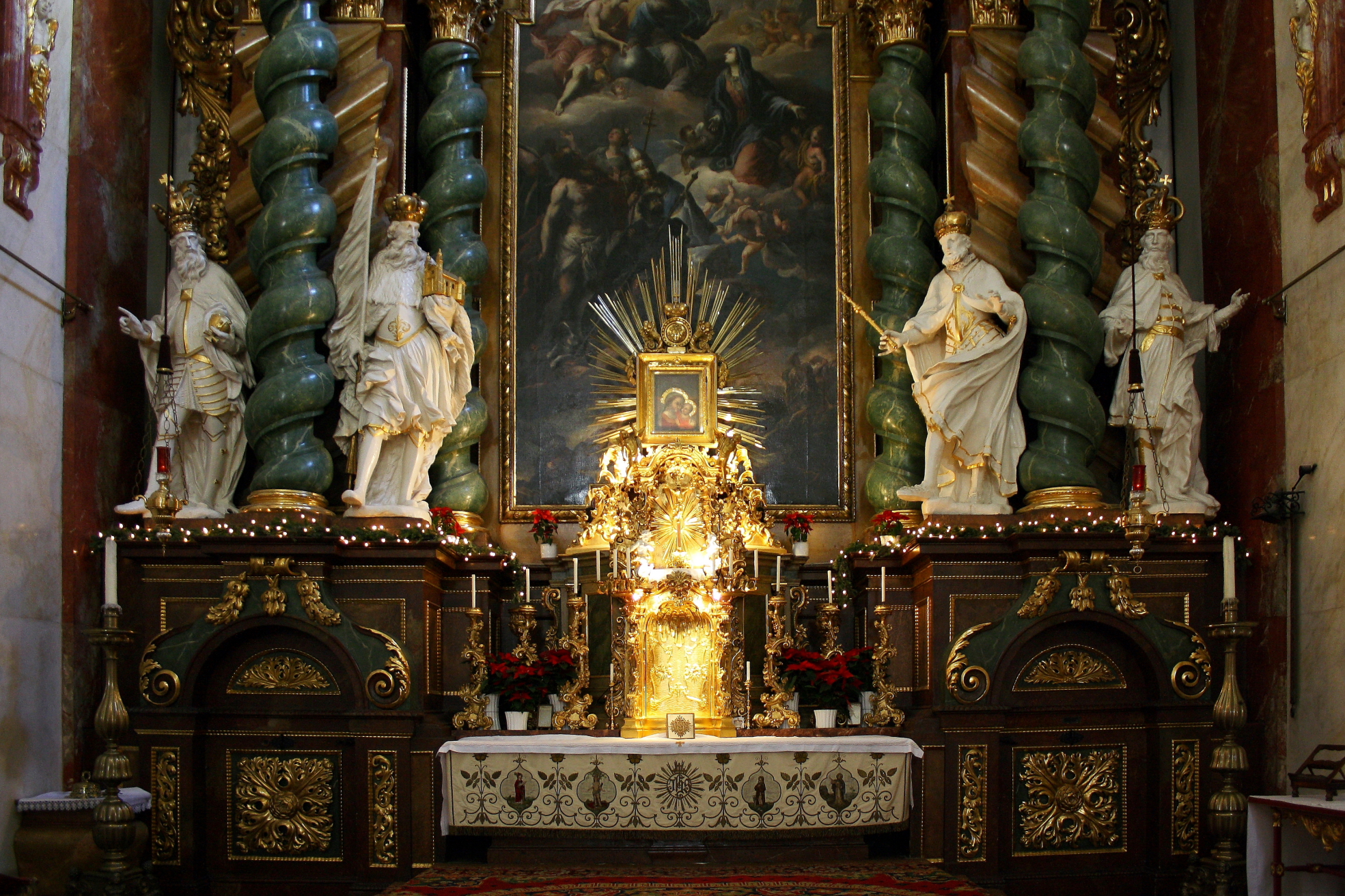 Der Tabernakel der Rochuskirche im 3. Wiener Gemeindebezirk Landstraße.